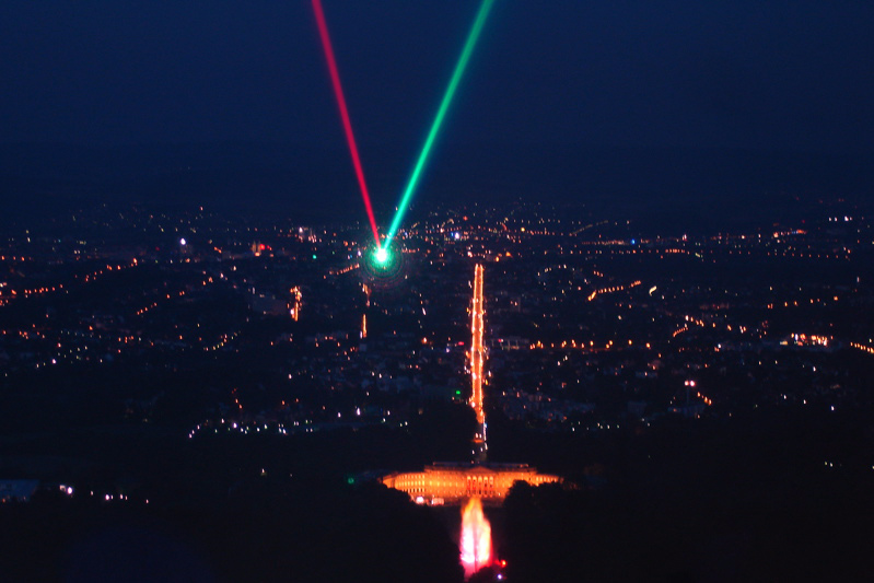 Leicht bearbeitete Variante des originalen Bildes Laserscape-KS-1.jpg- der rote Strahl ist intensiviert worden